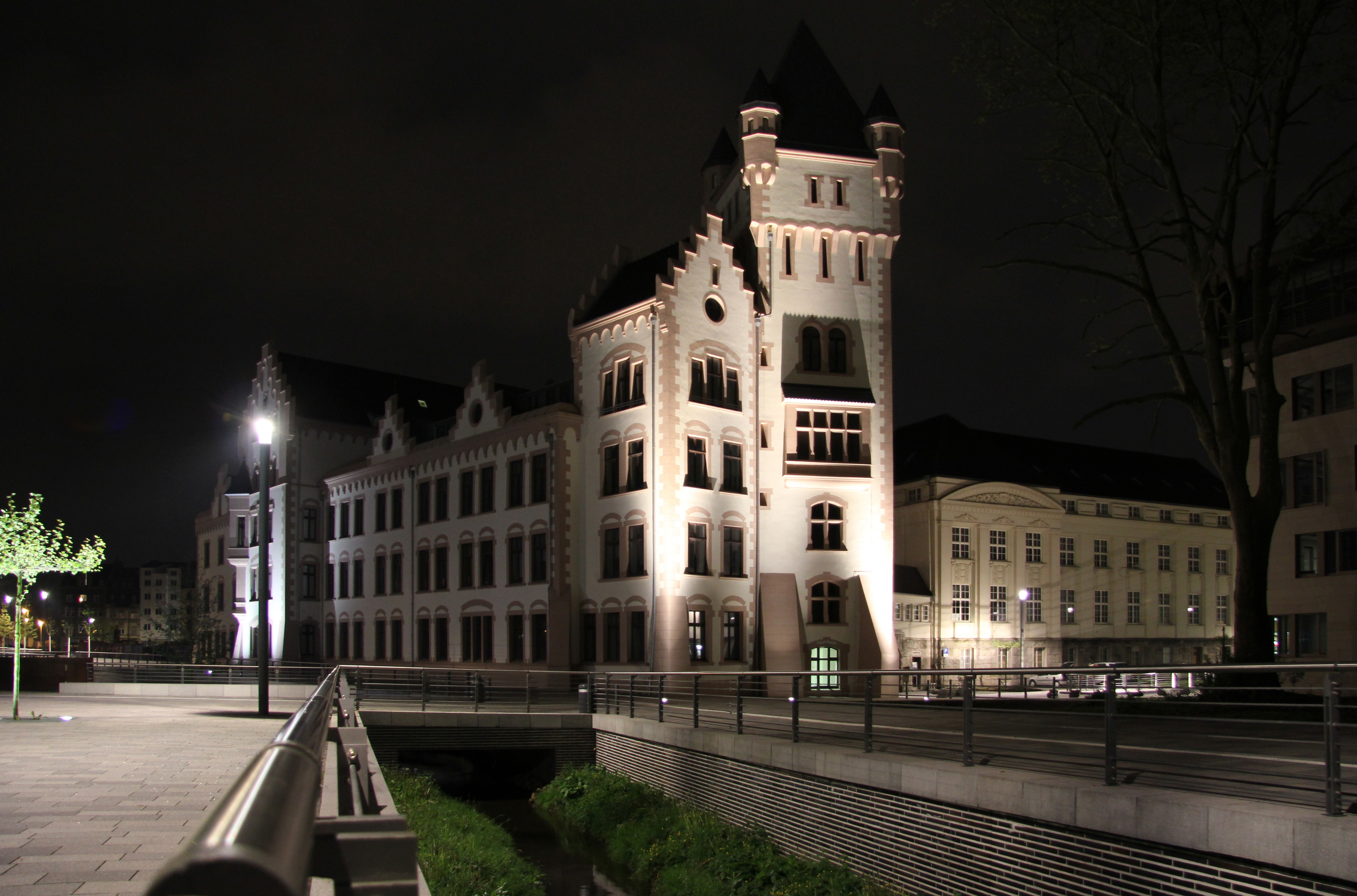 Nachtansicht der Hörder Burg